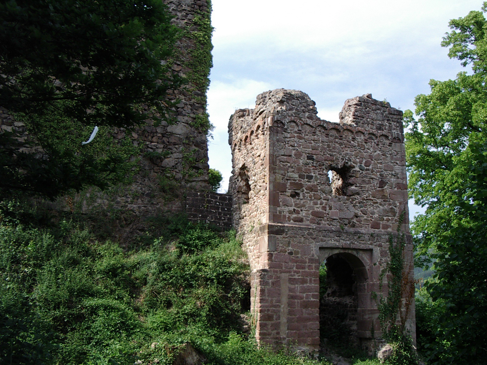 La ruine du château du Hugstein (Buhl, Haut-Rhin)